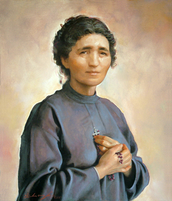 Beata Eurosia Fabris Barban, dipinto di Giuseppe Antonio Lomuscio